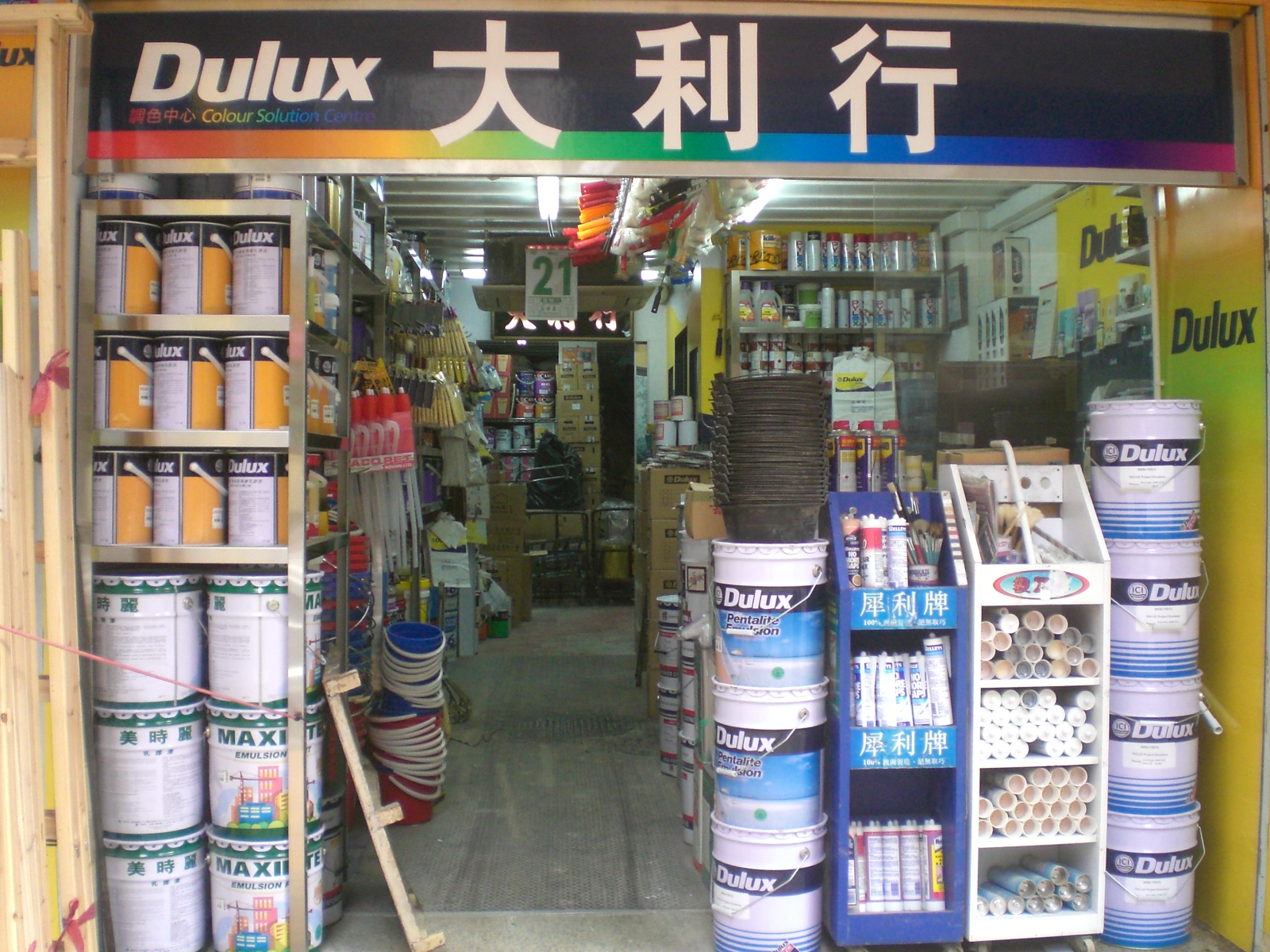 多樂士香港商店@德輔道西